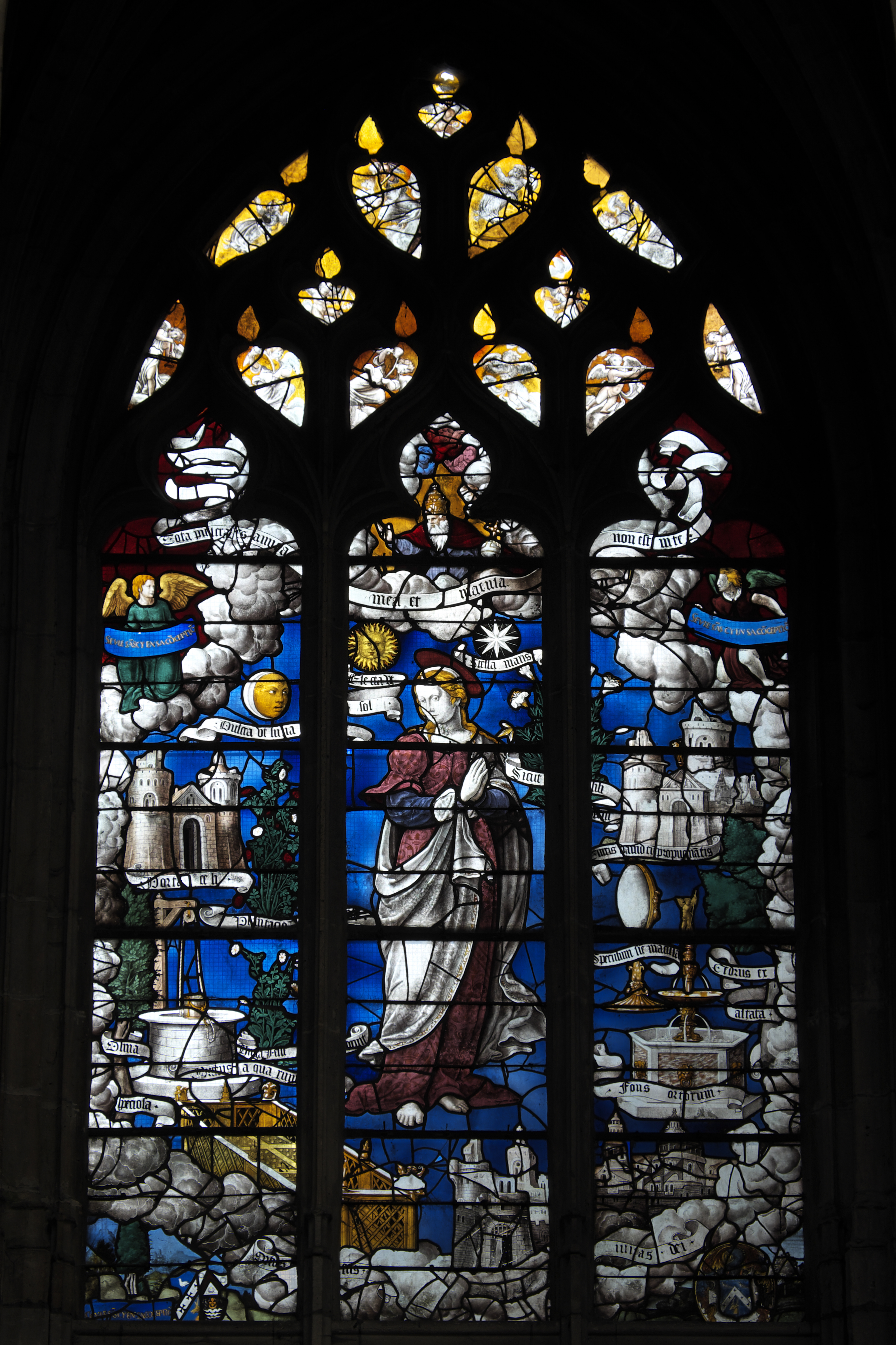 Katholische Kirche Sainte-Foy in Conches-en-Ouche im Département Eure (Haute-Normandie/Frankreich), Bleiglasfenster aus der 1. Hälfte des 16. Jahrhunderts; Darstellung: Maria mit ihren Symbolen